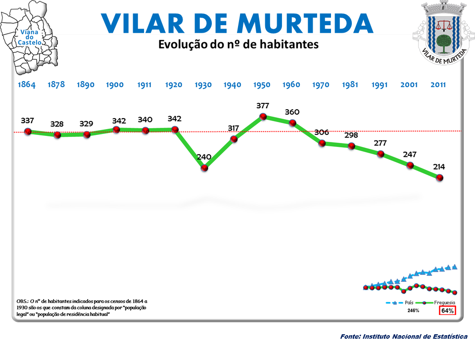 Censos 1864/2011